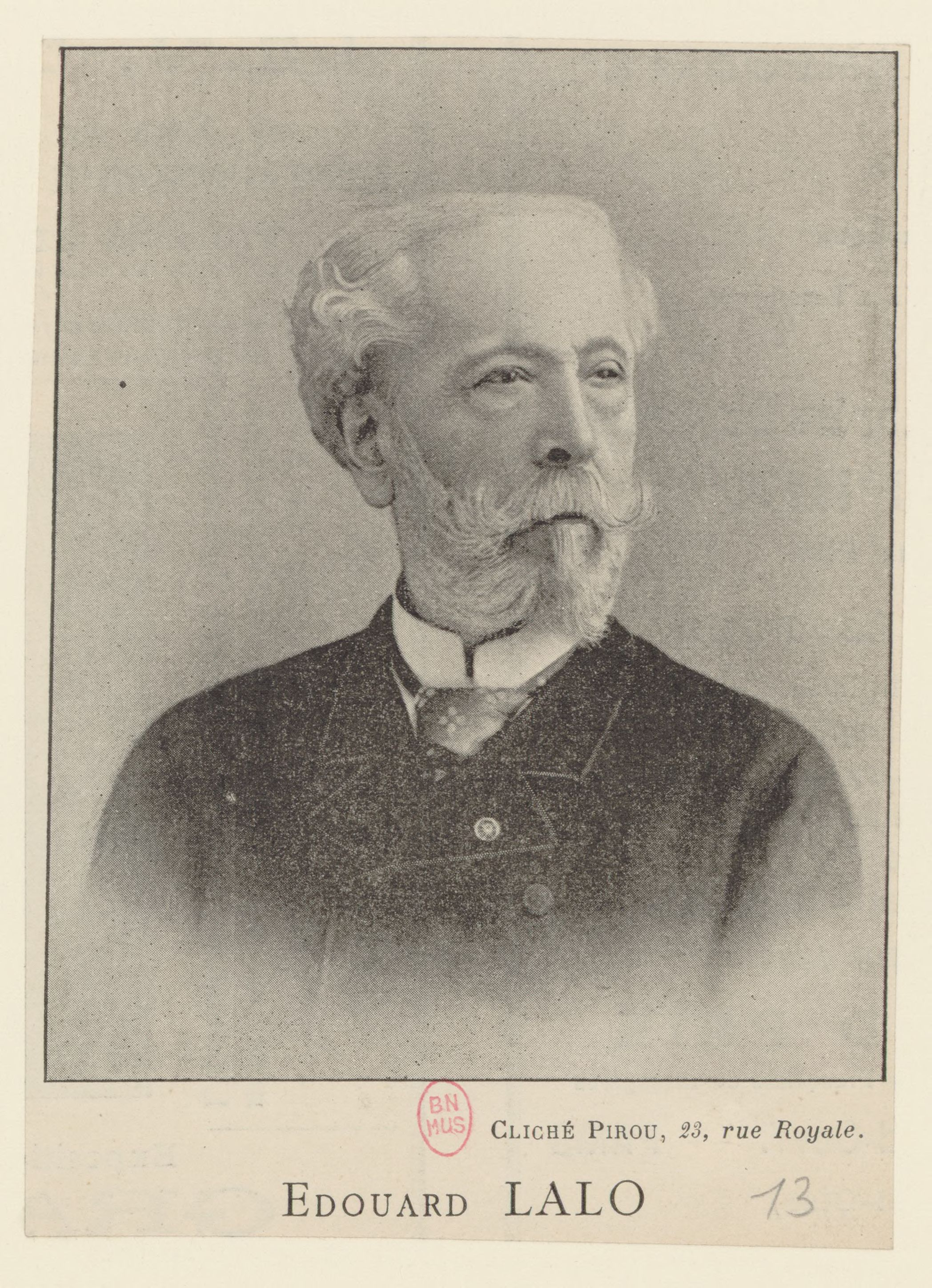 Photo d'Edouard LALO (1823-1892), d'après un cliché de Pirou. Impression photomécanique ; 11,5 x 8 cm.